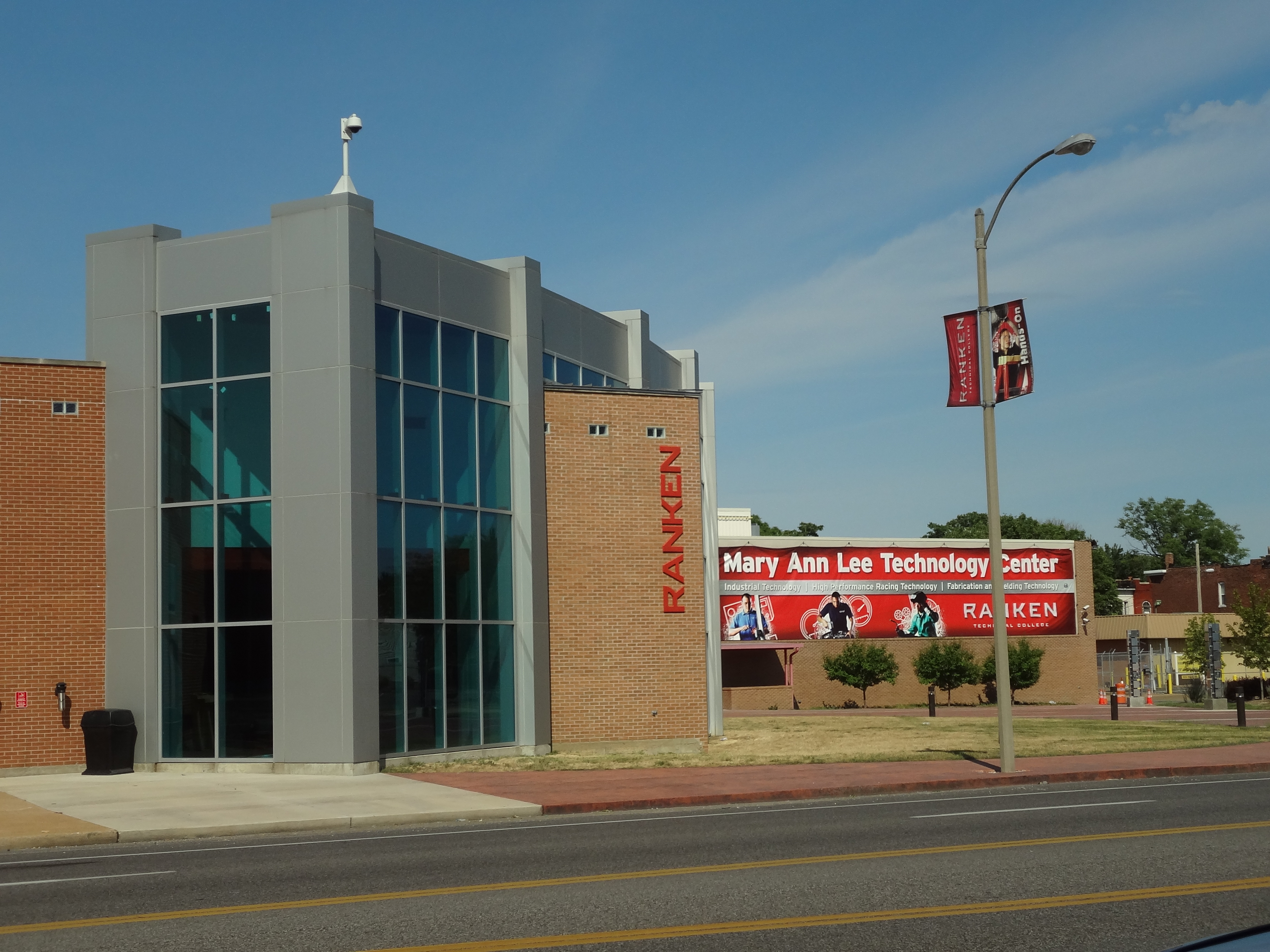 Ranken Tech